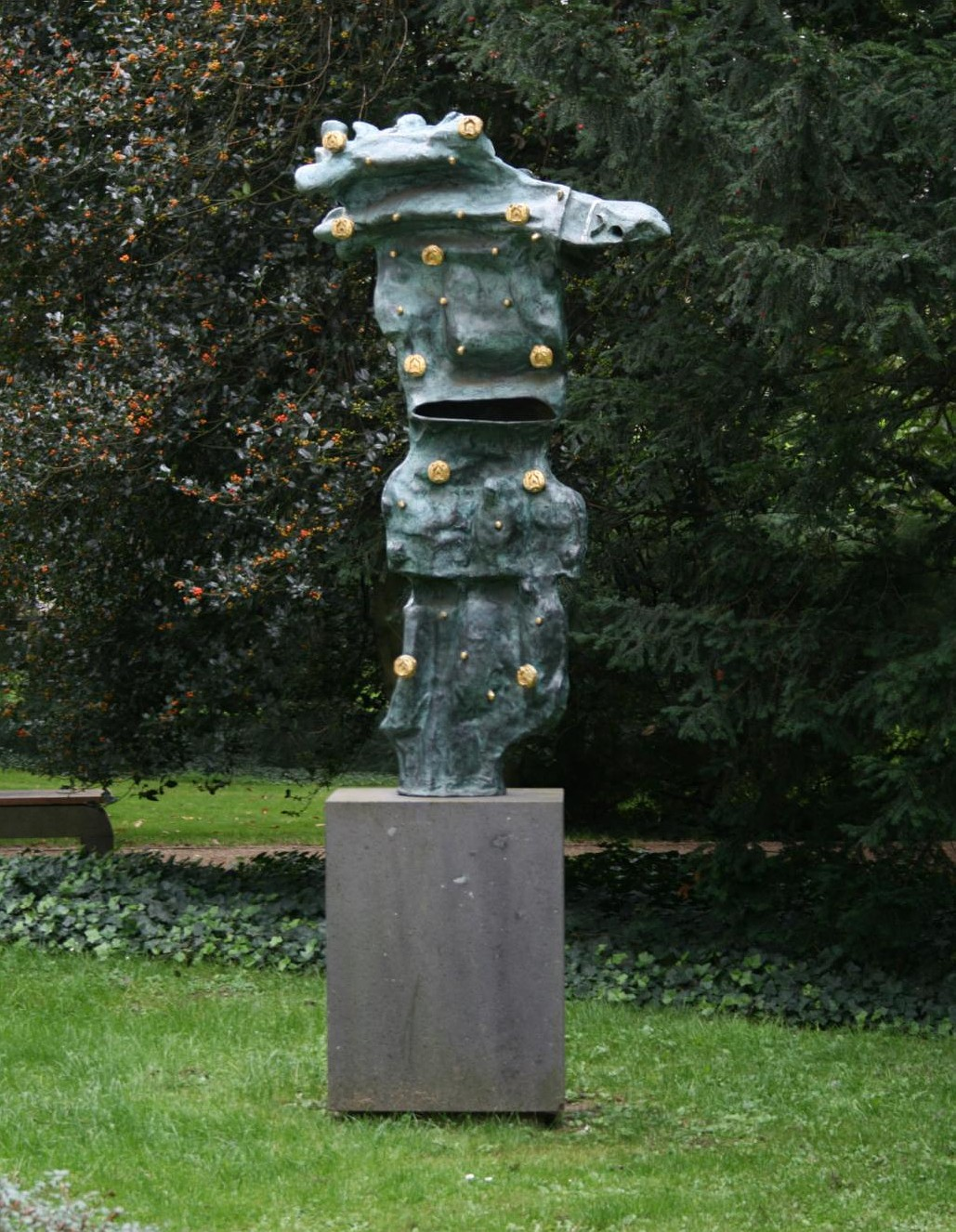 Skulptur "Chaosmos" in der Skulpturensammlung Viersen. Selbst fotografiert.